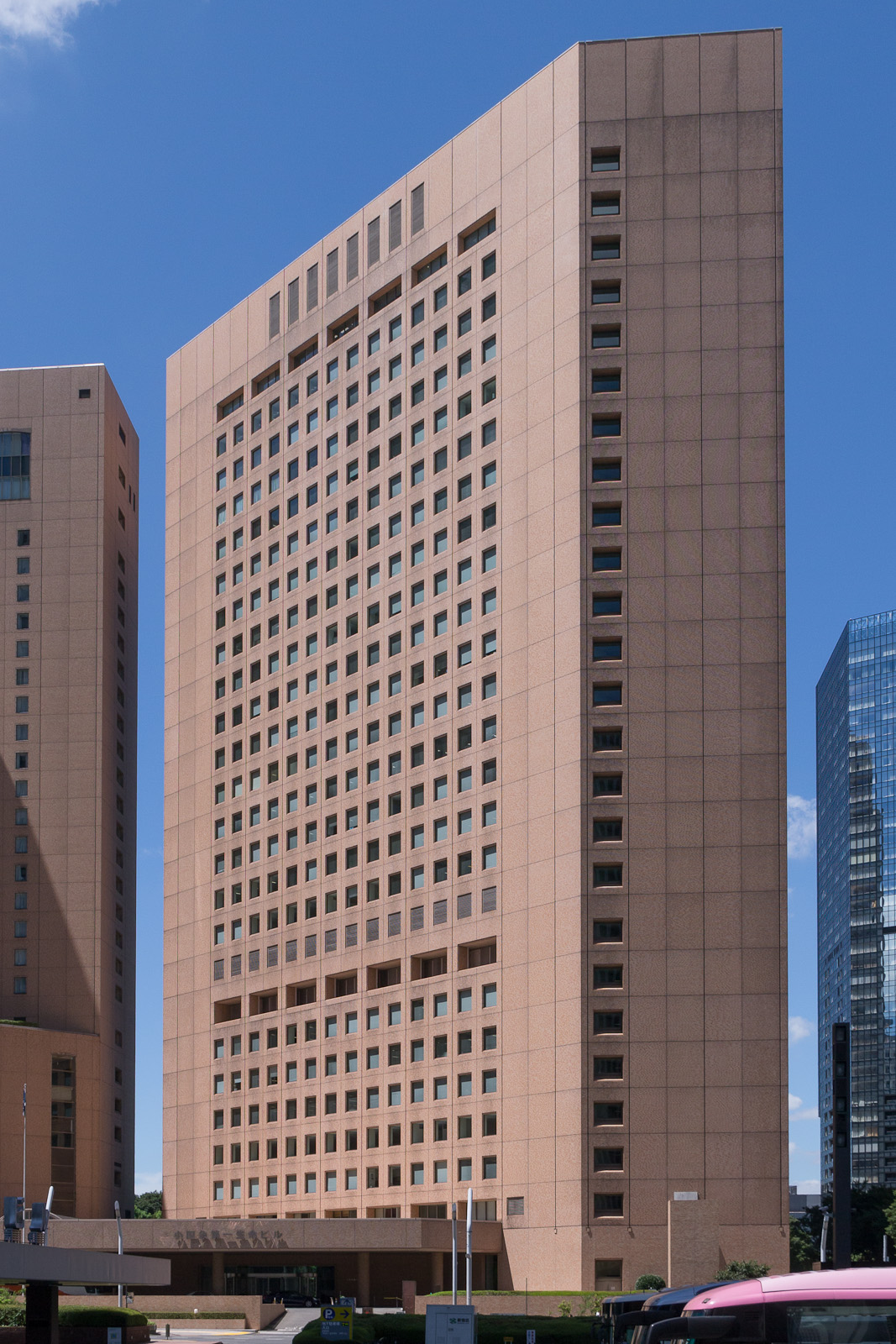 小田急第一生命ビル。